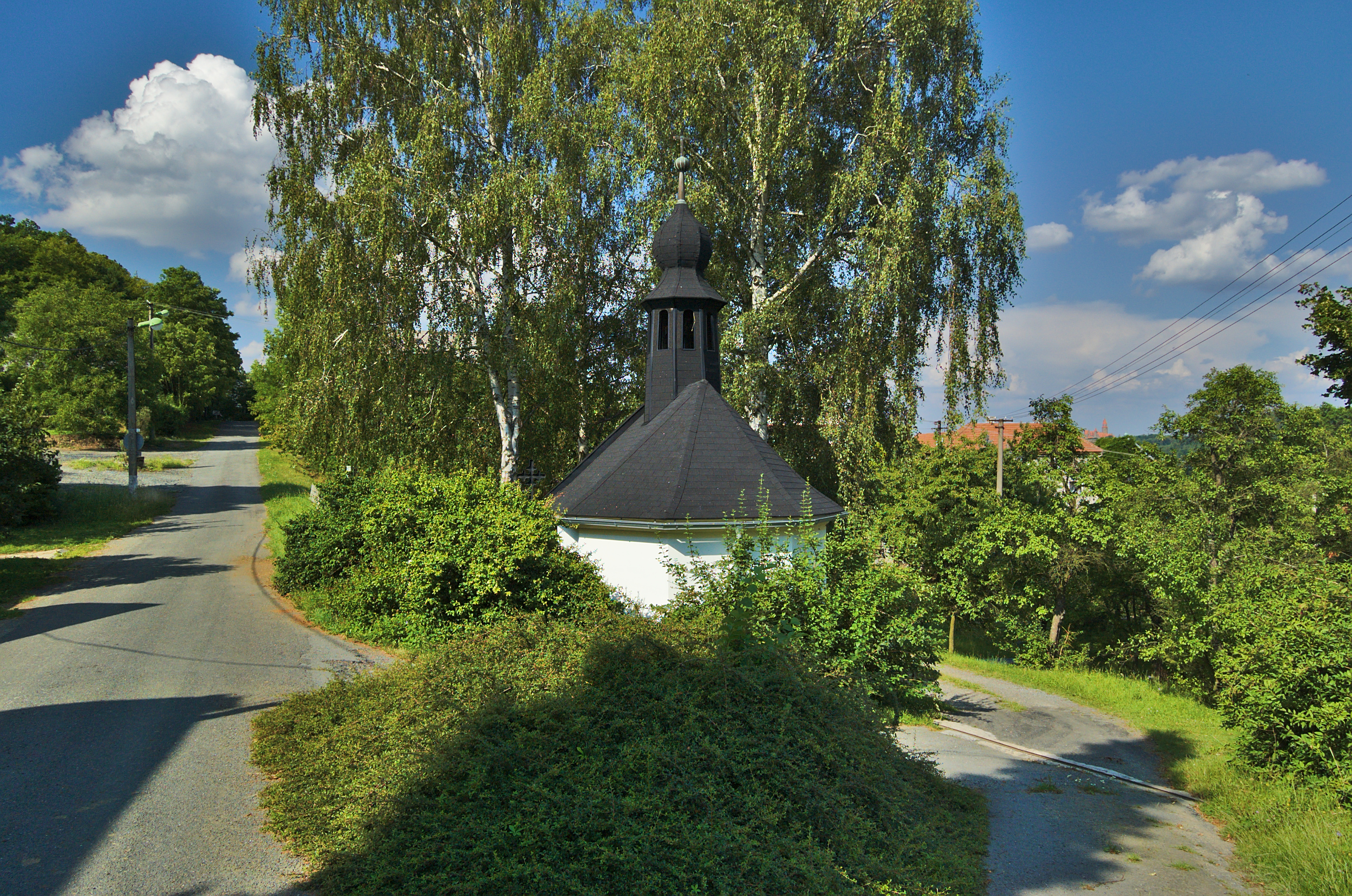 Kaple na návsi, Svojanov, Bouzov, okres Olomouc